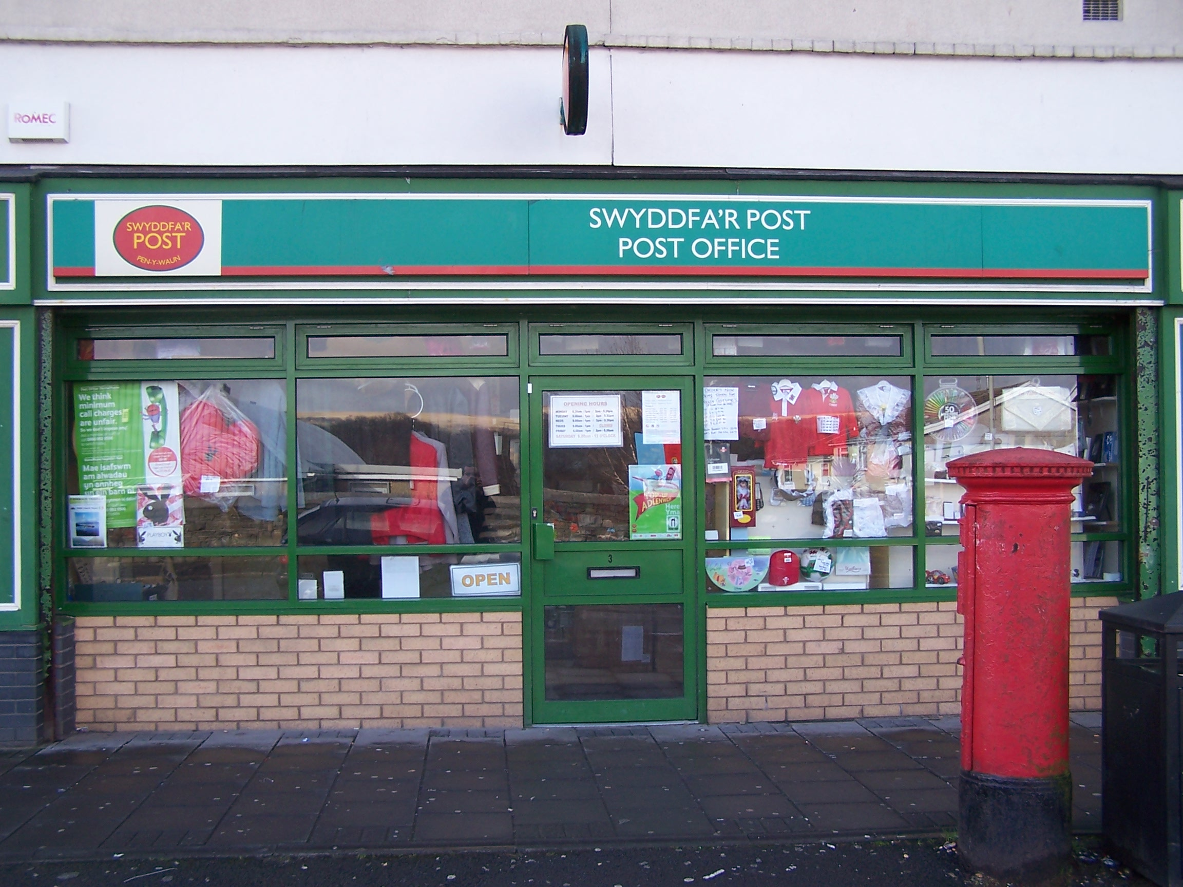 Penywaun Post Office, near Aberdare, Rhondda Cynon Taff